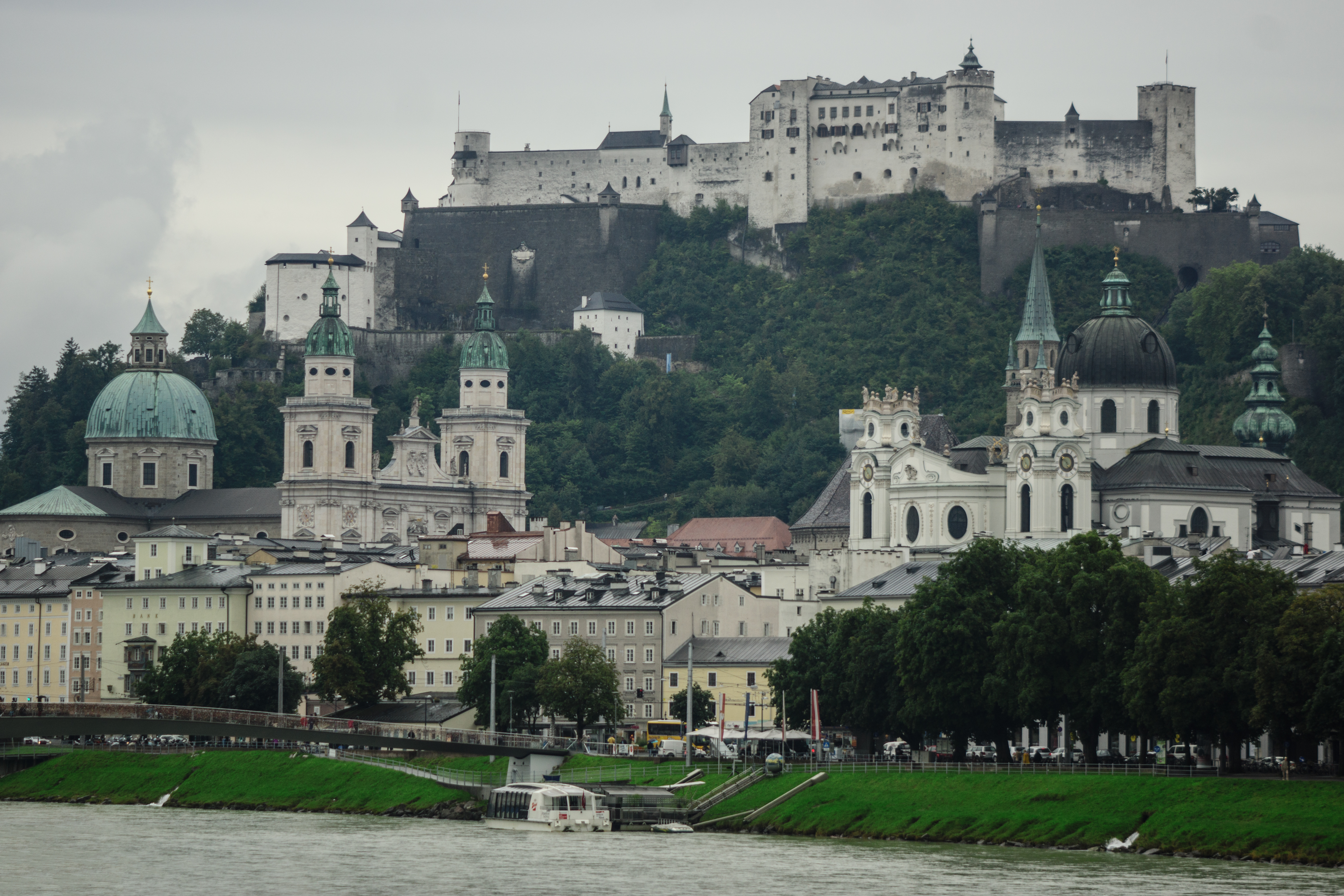 Vista desde el río de la Fortaleza Hohensalburg